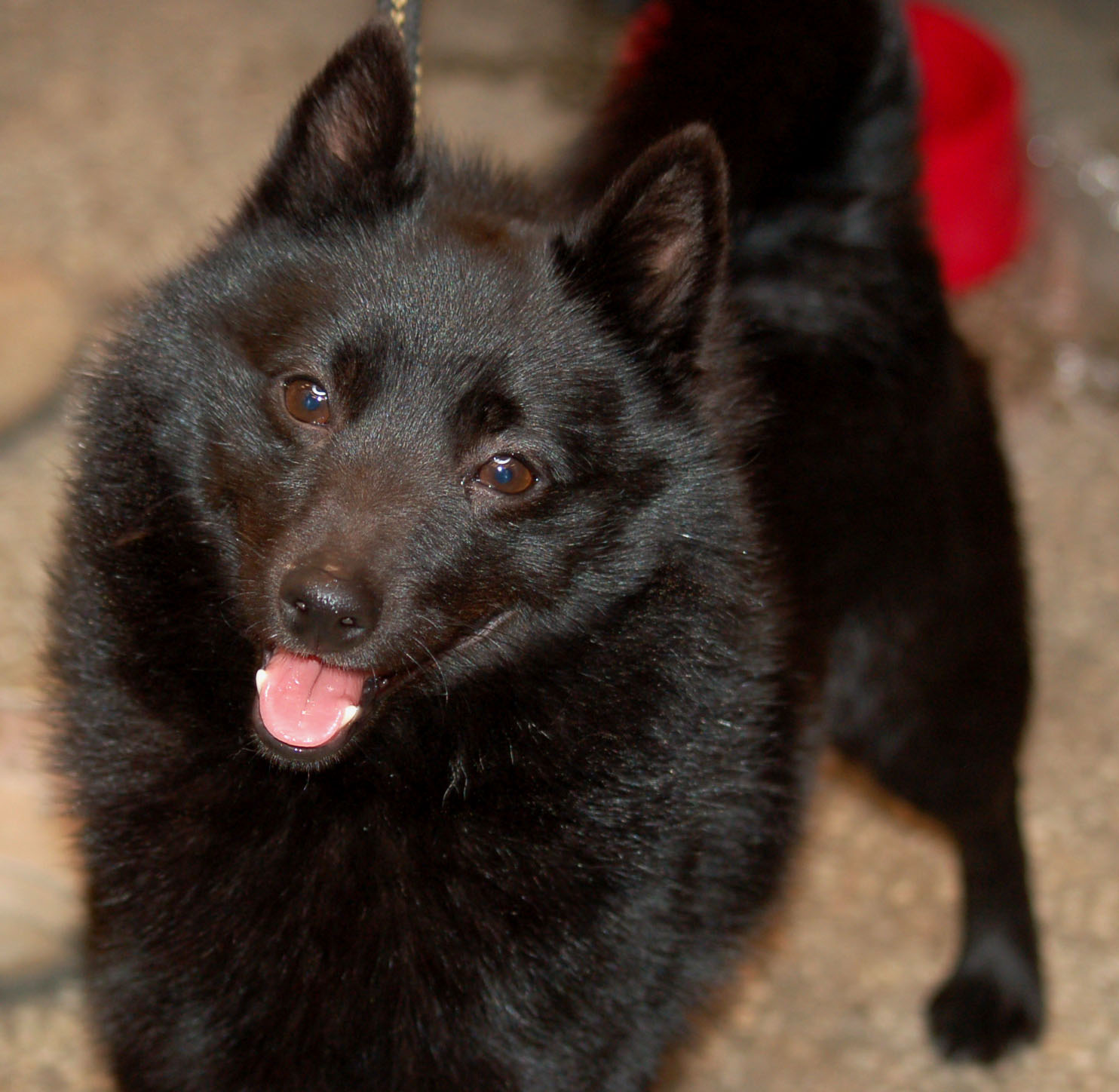 schipperke